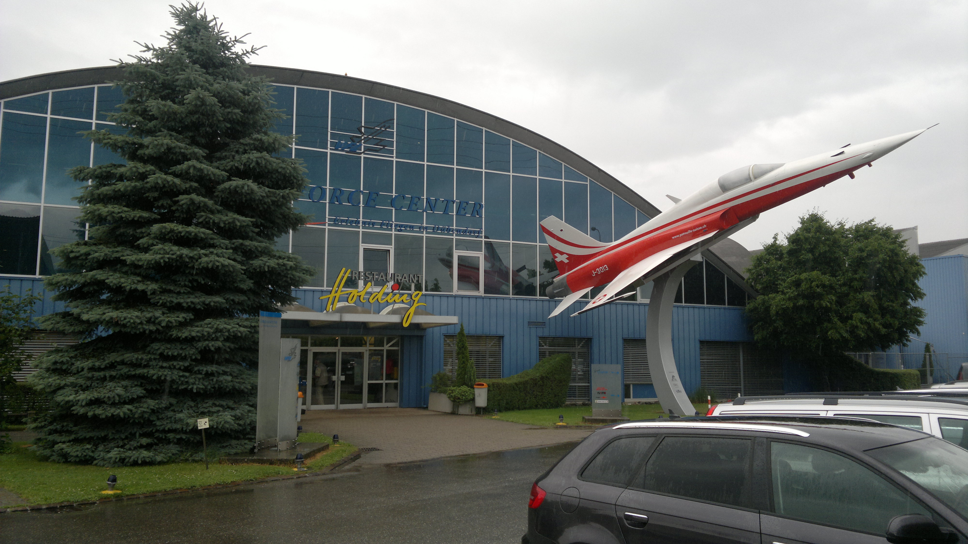 Eingang Fliegermuseum Dübendorf